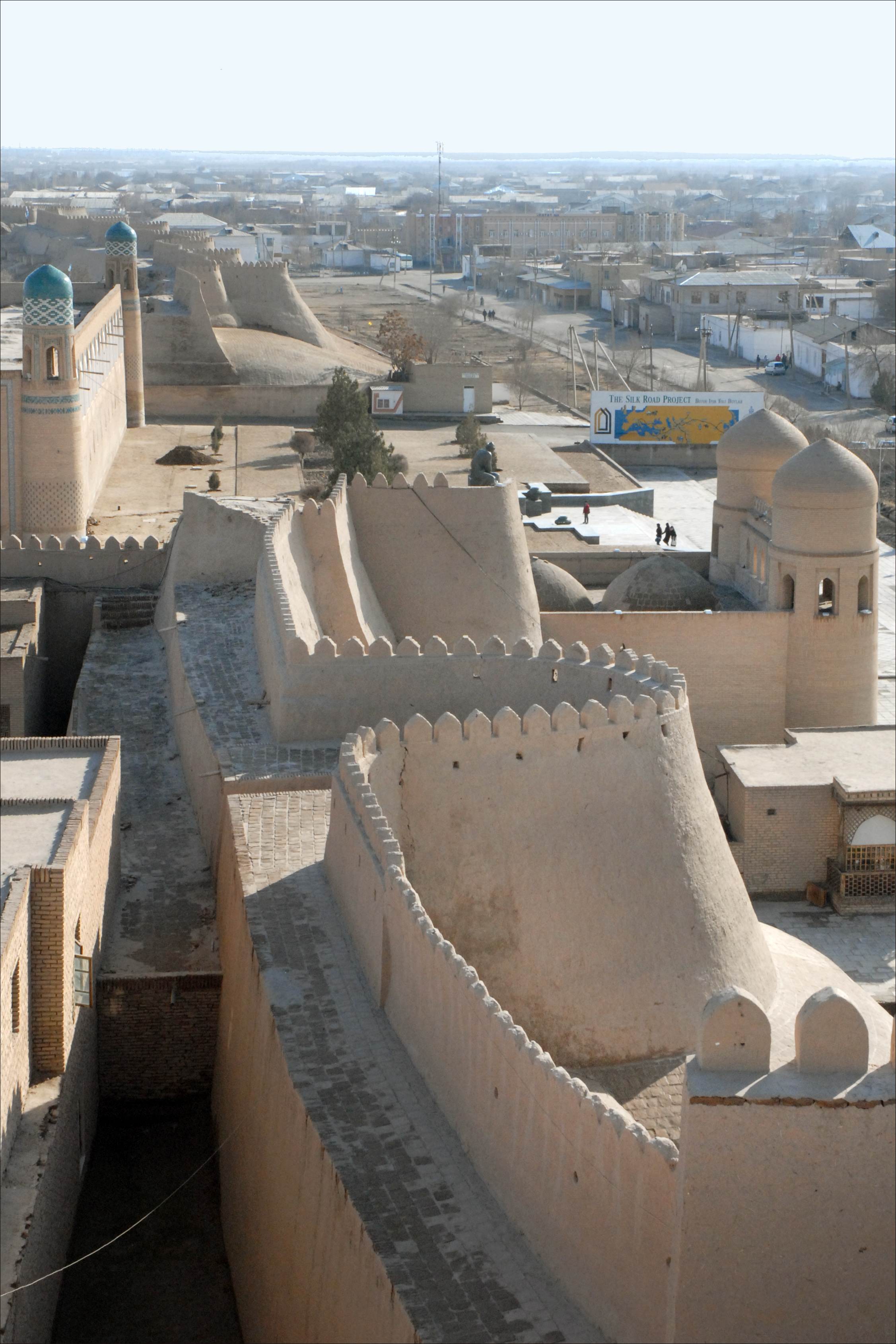 Restaurée à l'époque soviétique, la ville ancienne de Khiva (Ichan Kala) a été inscrite par l'UNESCO sur la liste du patrimoine mondial. C'est devenue une ville-musée mais près de 1500 familles y vivent aujourd'hui. Elle est située dans la région du Khorezm, très proche de la frontière avec le Turkménistan. Cette oasis sur la route de la soie est habitée depuis plus de 2.500 ans. Elle est entourée de murailles en terre séchée (pisé) et en briques et comprend de nombreux bâtiments religieux : mosquées et minarets, médersas, mausolées, palais..